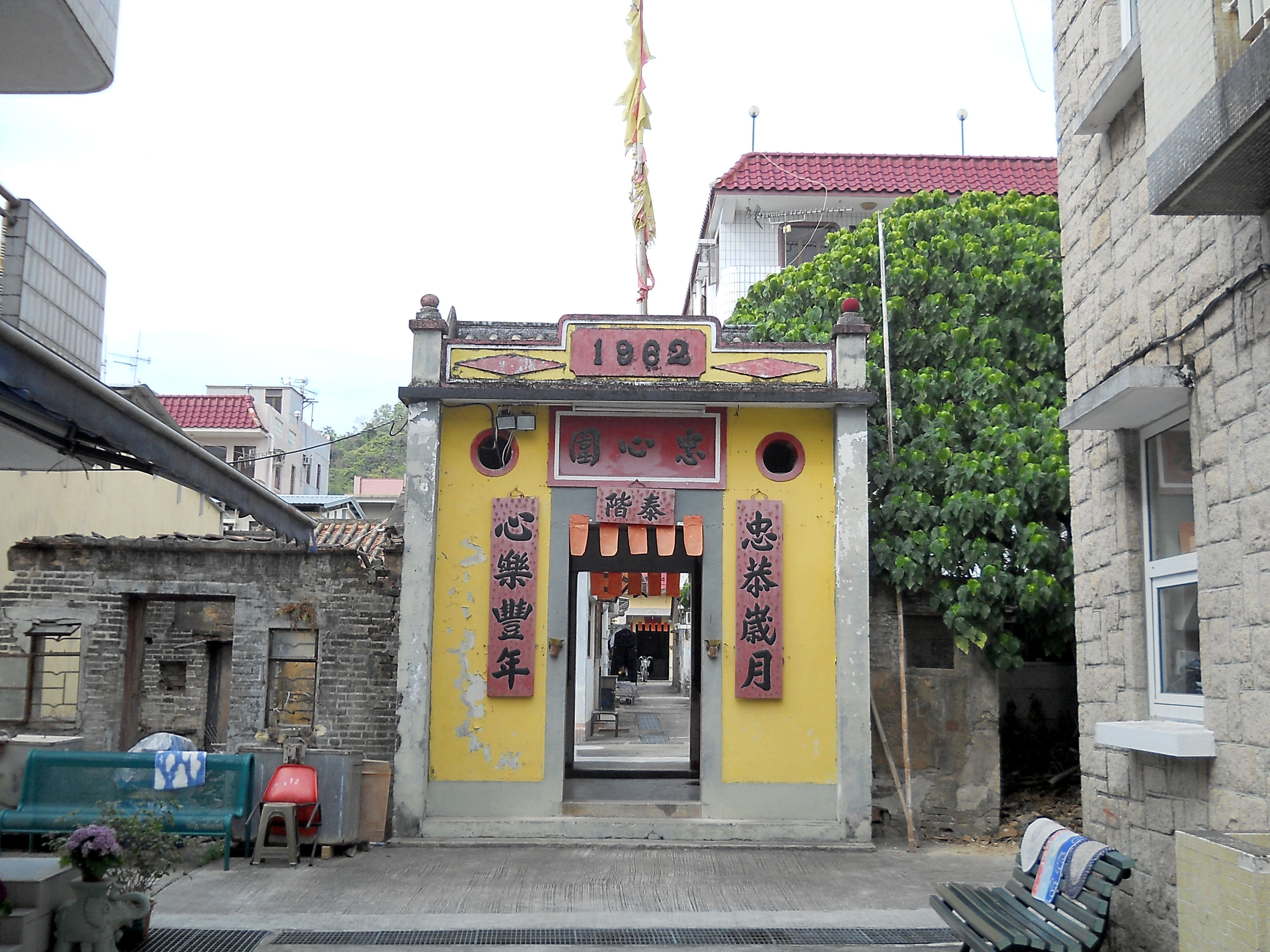 中文（香港）: 橫洲忠心圍